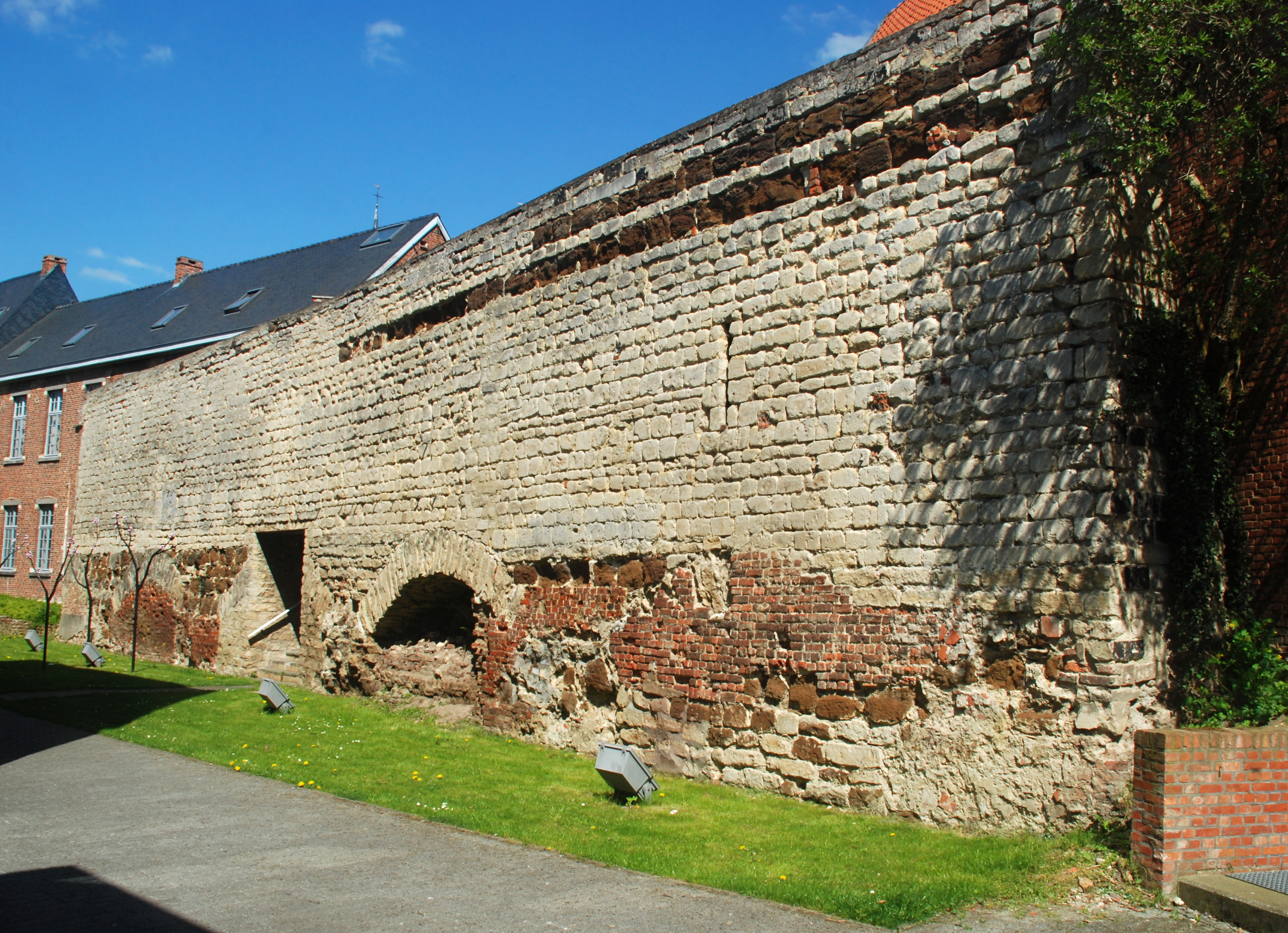 Belgique - Brabant flamand - Louvain - Première enceinte de Louvain - Rue de Redingen